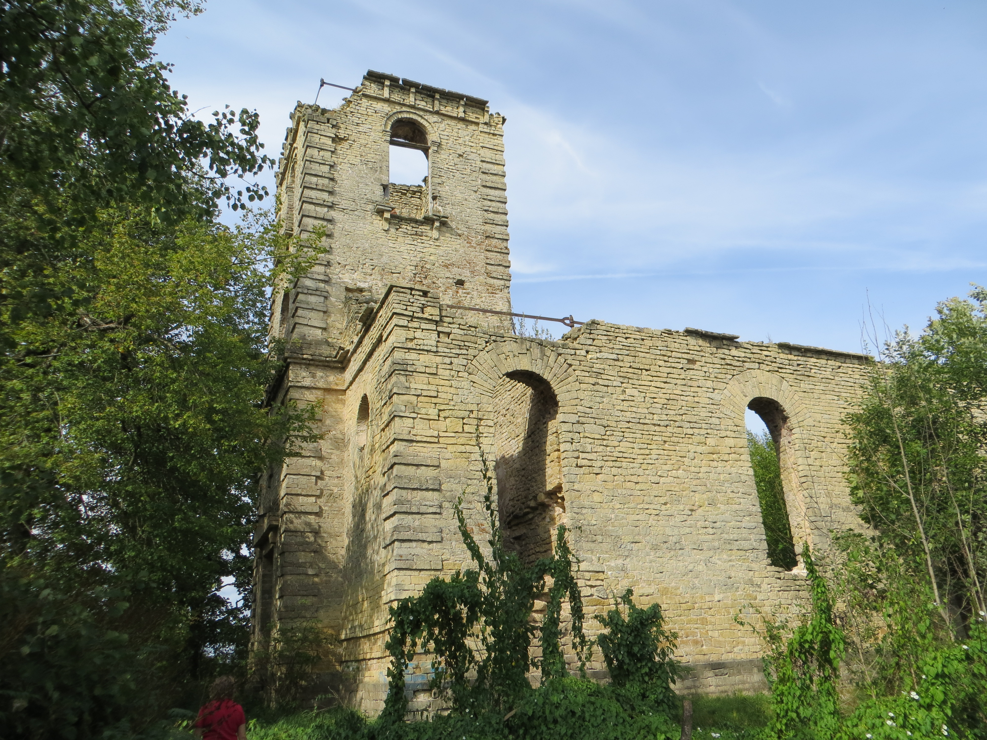 Кирха в деревне Шпаньково.